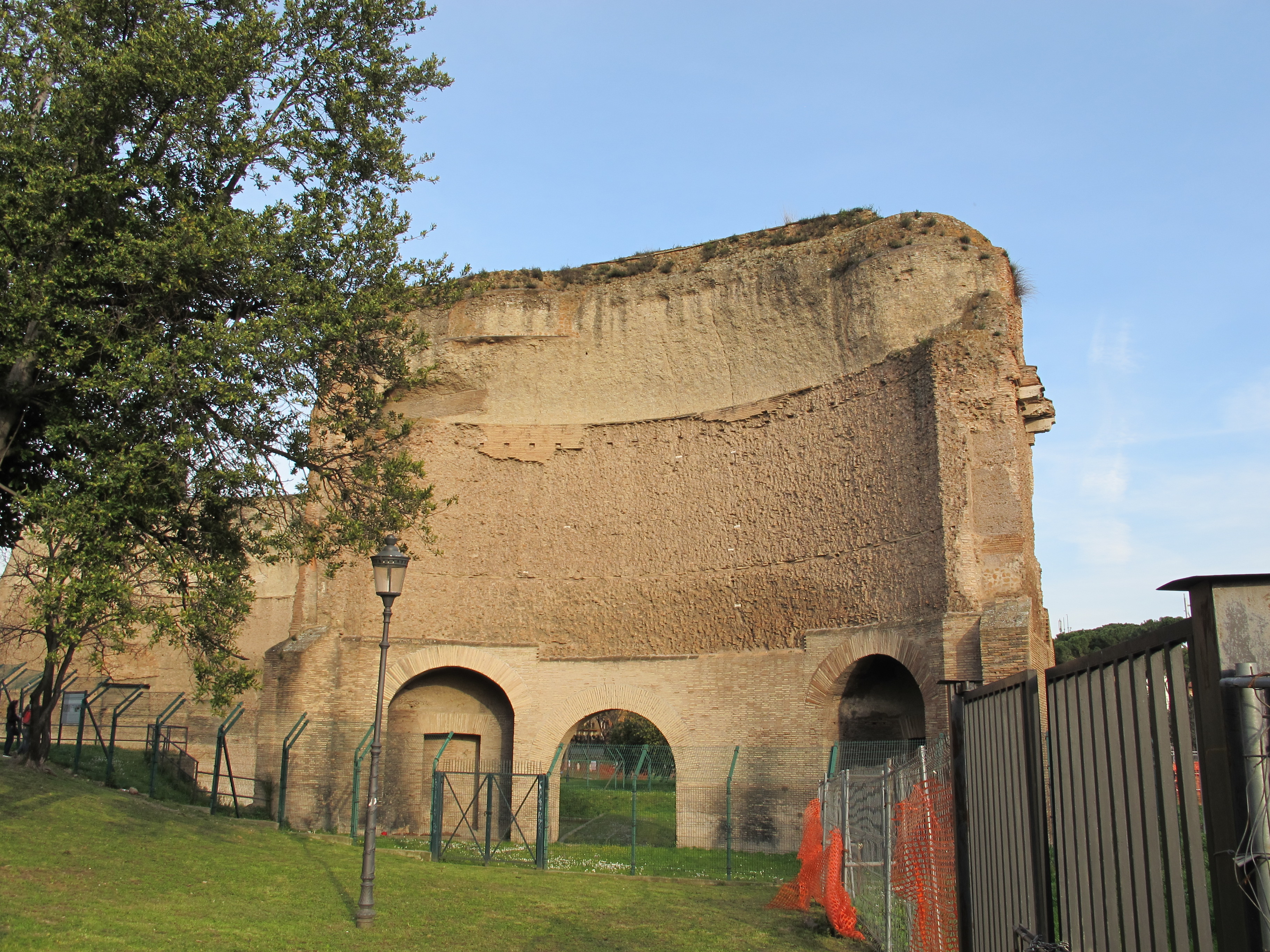 Terme di traiano